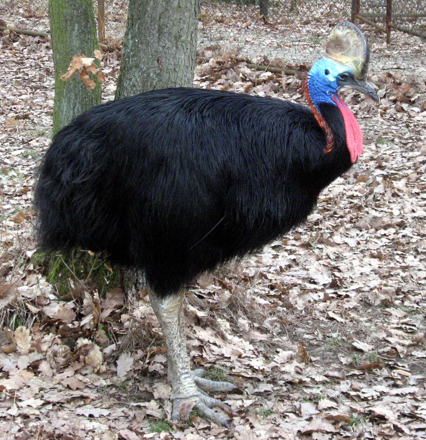 Kasuár přilbový